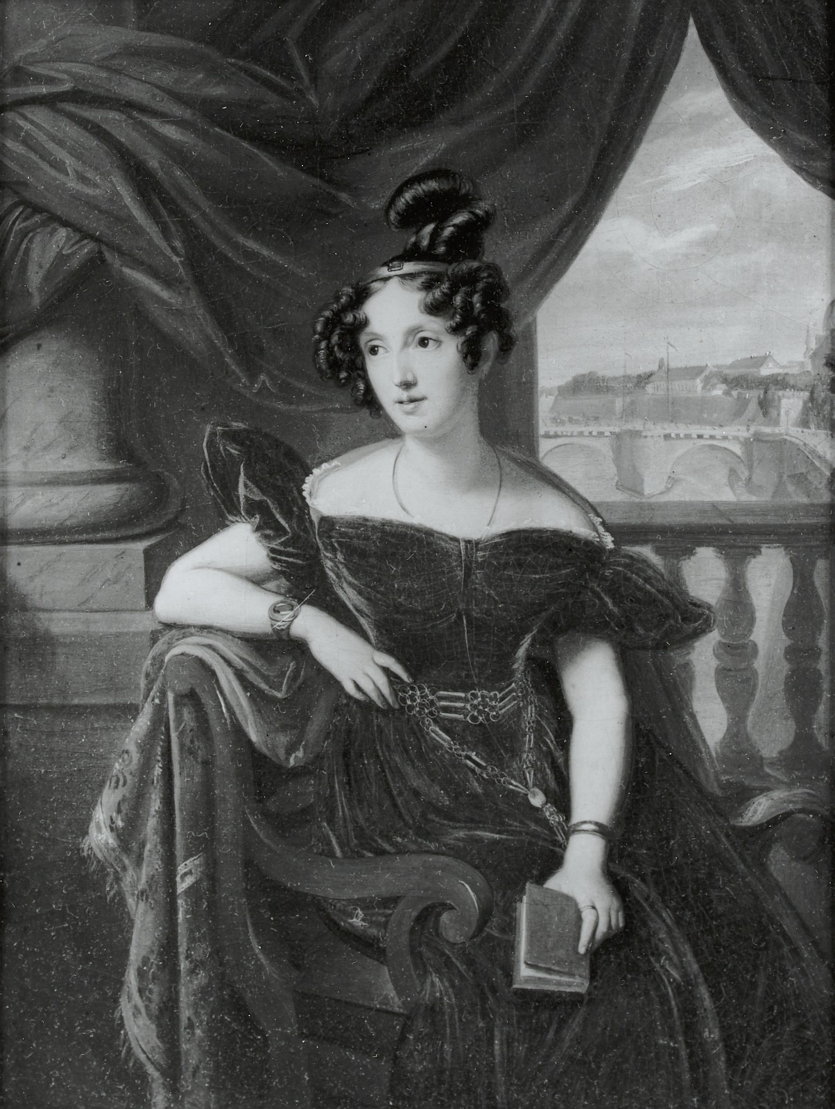 Marie Luise, Prinzessin von Sachsen, geb. Prinzessin von Lucca Lebensdaten : 1802-1857 Beruf : 2. Frau Herzog Maximilians